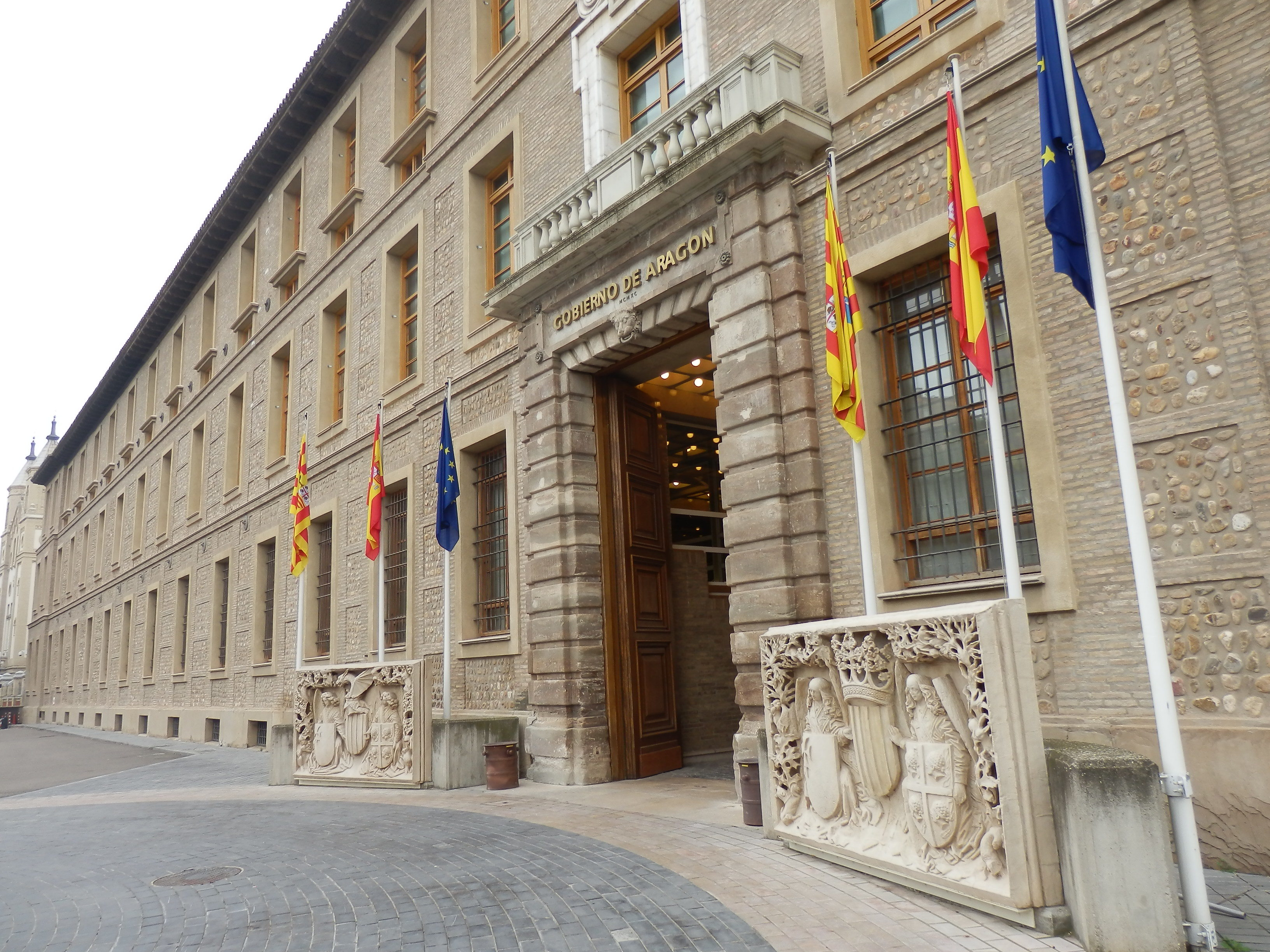 Edificio Pignatelli en Zaragoza.